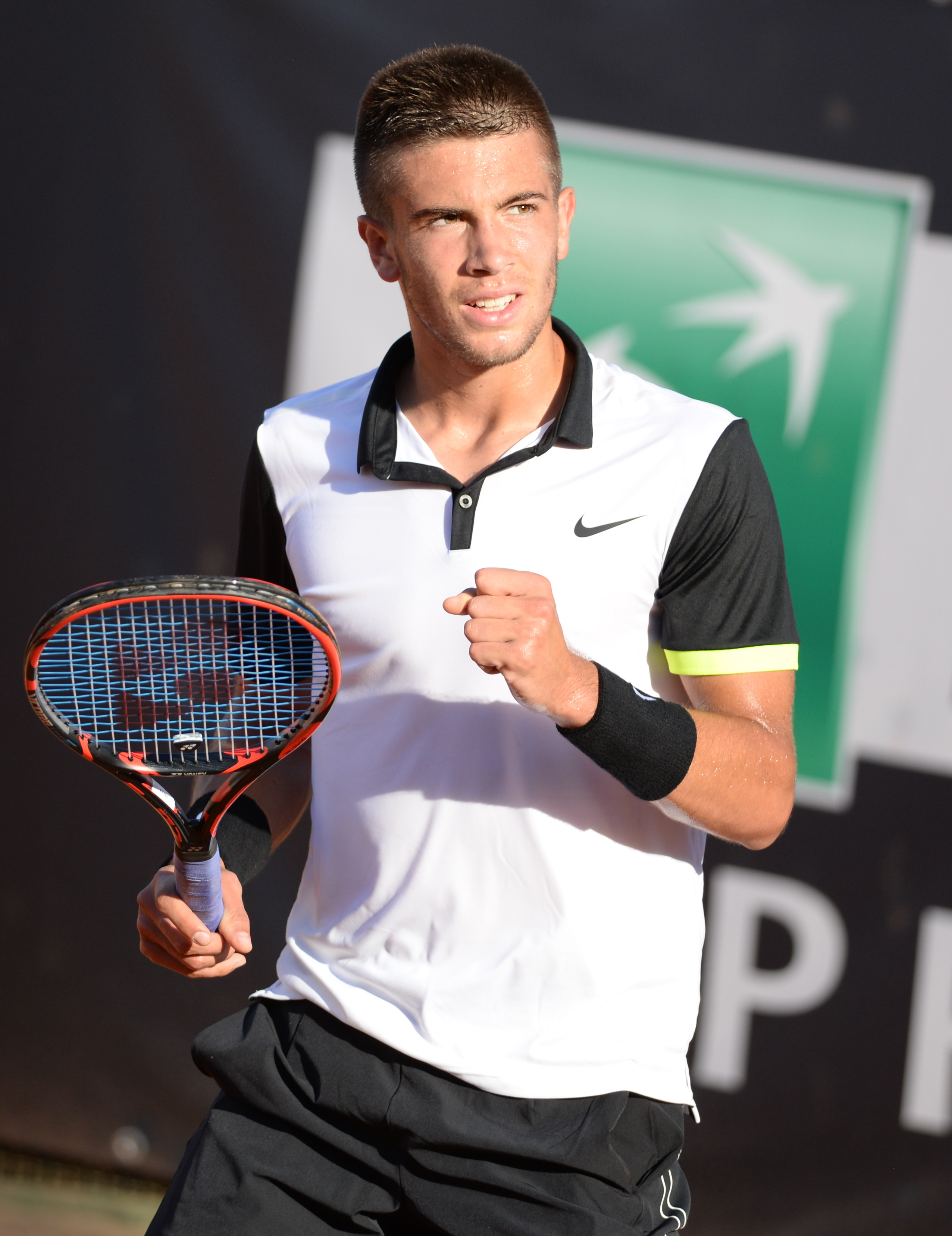 Borna Coric